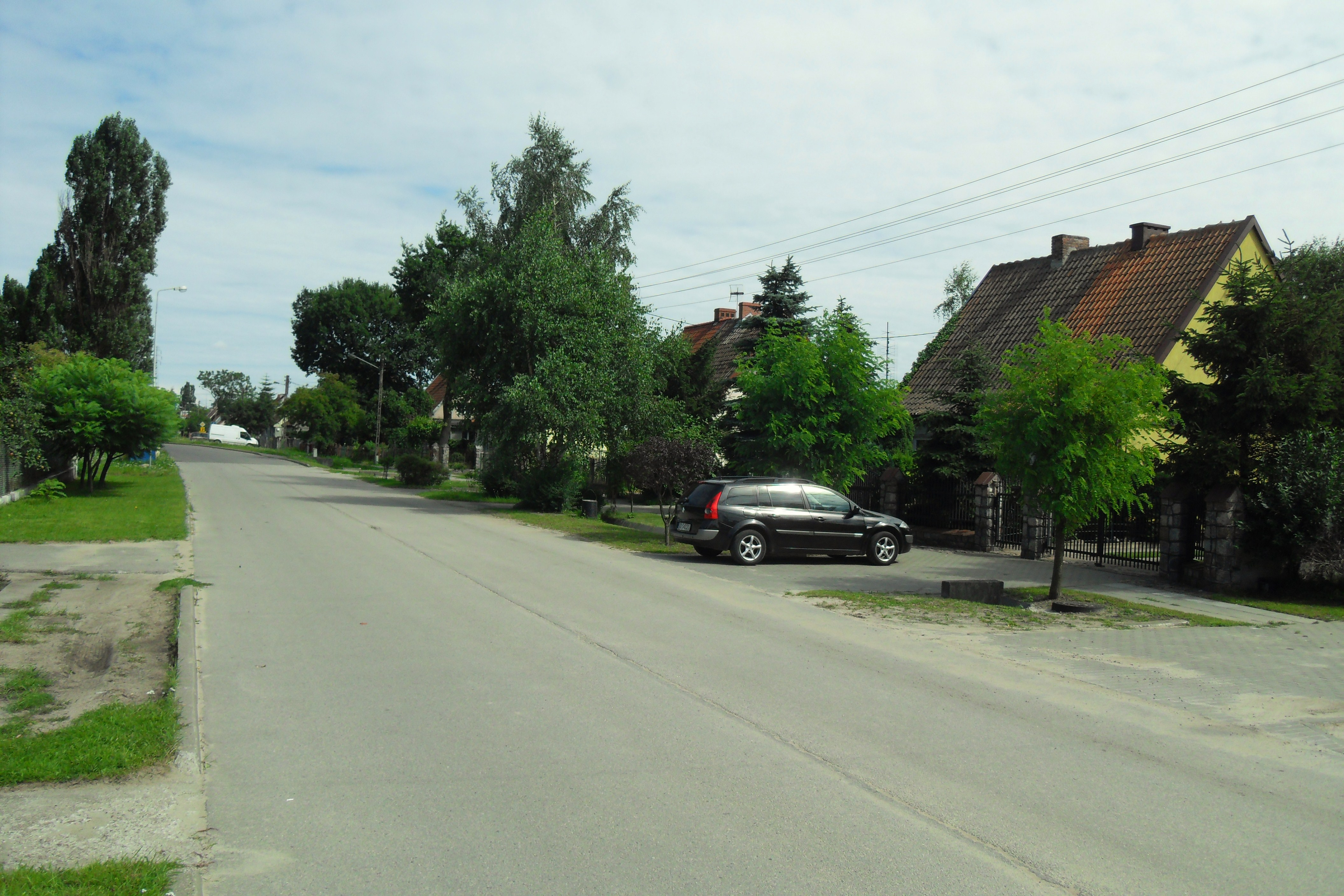 Gdańsk Rudniki, ul. Miałki Szlak.